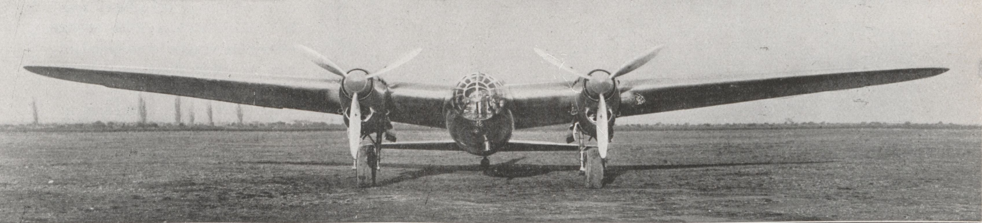 Aspect d'un AMIOT-S. E. C. M. 350, à moteurs HISPANO-SUIZA 12 Y 28 et 29.